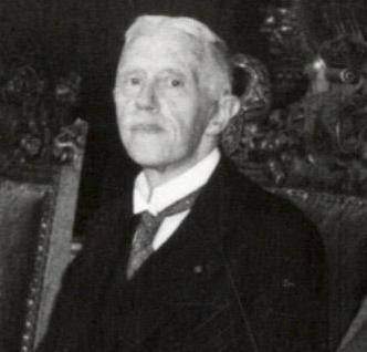 Dirk Jan de Geer (1870-1960), Nederlands politicus